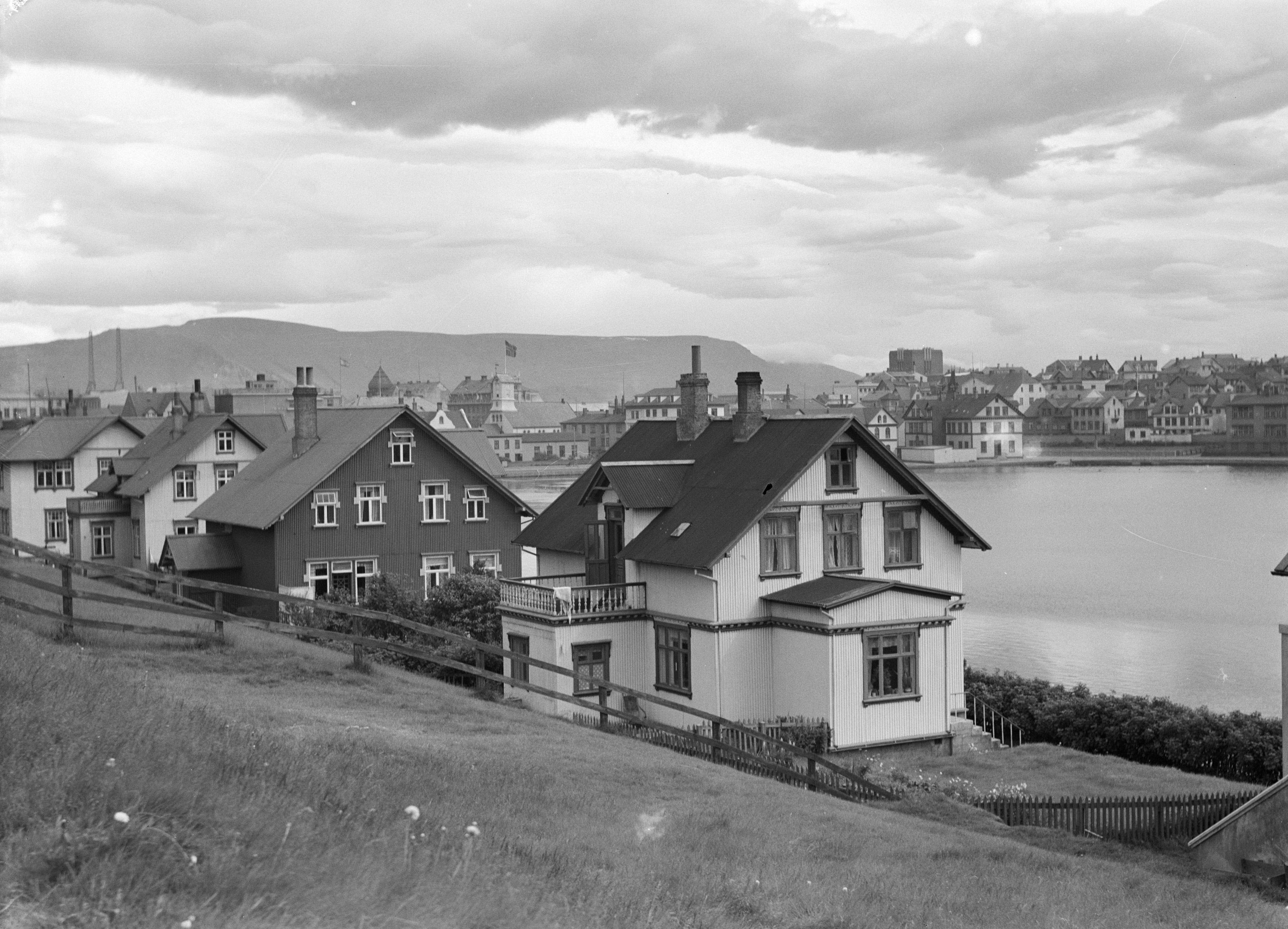 Collectie / Archief : Fotocollectie Van de Poll Reportage / Serie : IJsland Beschrijving : Gezicht over de oude stadskern met vila's van Reykjavik met in het midden de onopvallende Domkerk Datum : 1934 Locatie : IJsland, Reykjavik Trefwoorden : architectuur, heuvels, kerkgebouwen, stadsbeelden, villa's, woningen Fotograaf : Poll, Willem van de, [onbekend] Auteursrechthebbende : Nationaal Archief Materiaalsoort : Glasnegatief Nummer archiefinventaris : bekijk toegang 2.24.14.02 Bestanddeelnummer : 190-0394